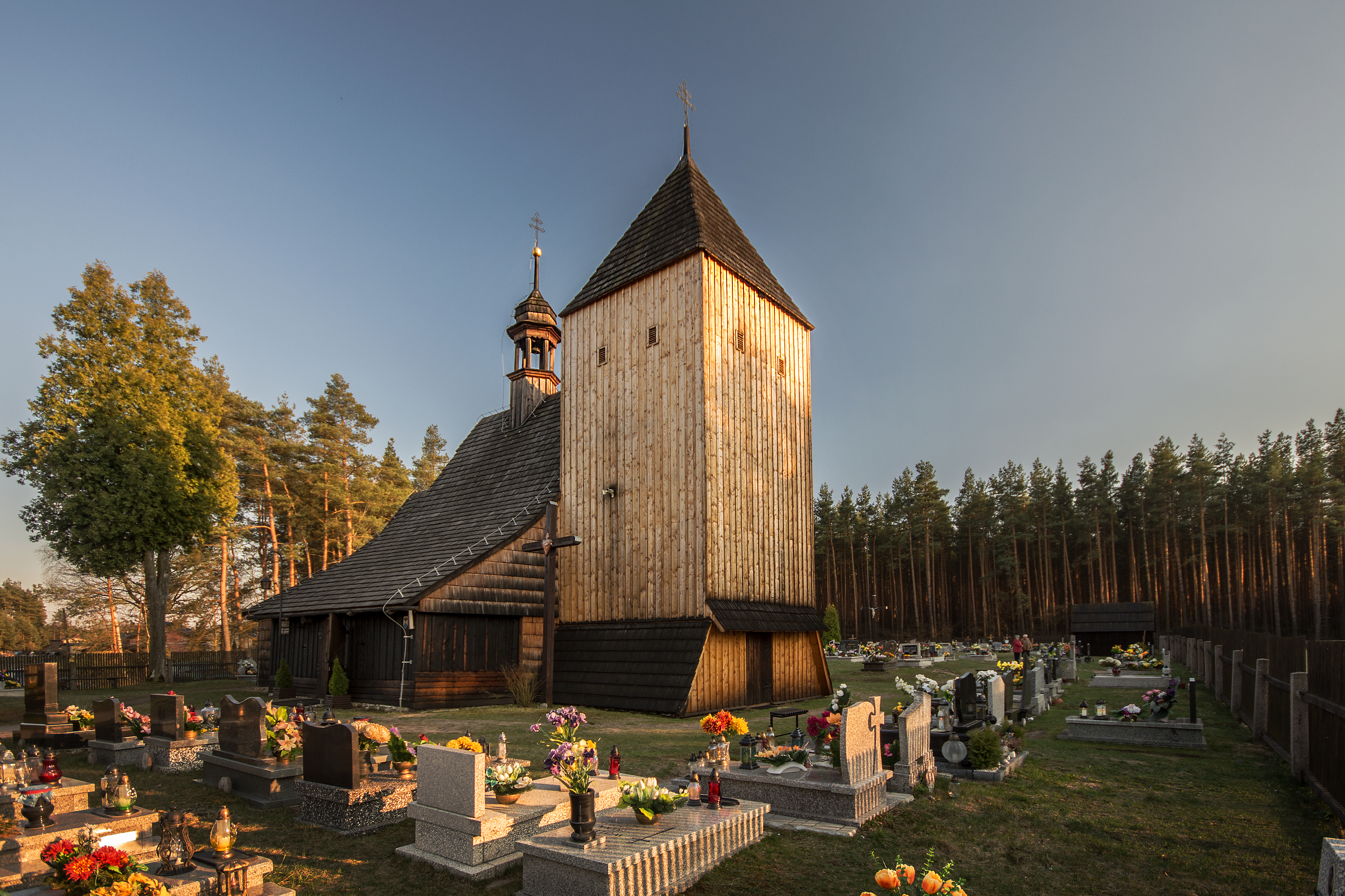 Brusiek, kościół filialny pw. św. Jana Chrzciciela, 2 poł. XVII